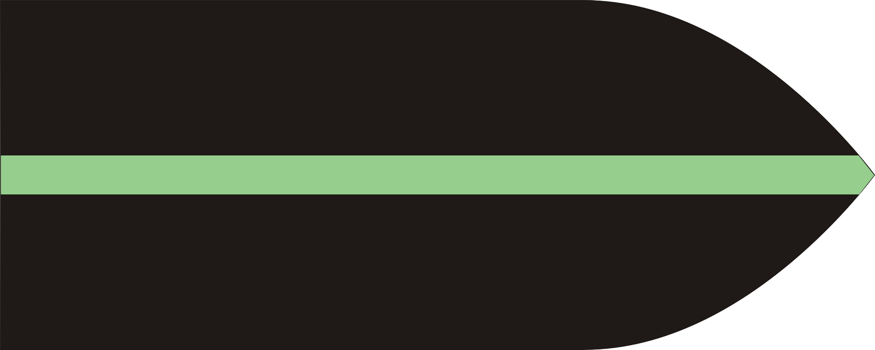 Barwy baterii przeciwpancernej 2 Dywizji Strzelców Pieszych Polskich Sił Zbrojnych na Zachodzie